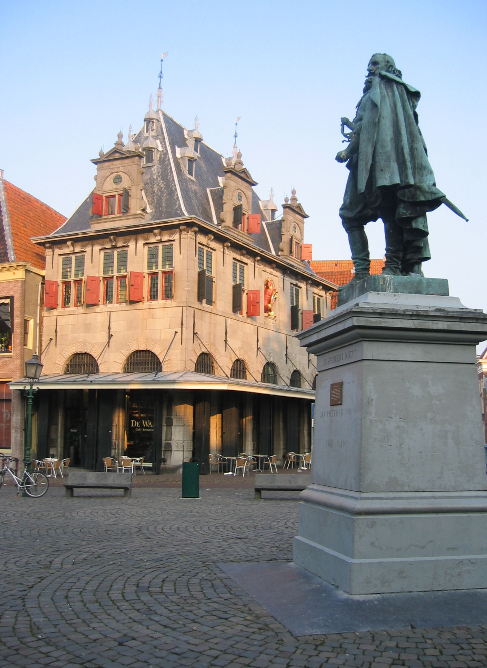 Beeld in Hoorn. Eigen foto. Hoge kwaliteit plaatje; iedereen kan het zelf verkleinen. GerardM 1 mrt 2004 07:40 (CET) Categorie:Afbeelding Hoorn (Noord-Holland) Gambar:Jan Pietersz. Coen.jpg